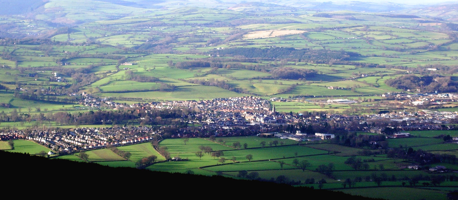 Панорамен изглед от Ридин